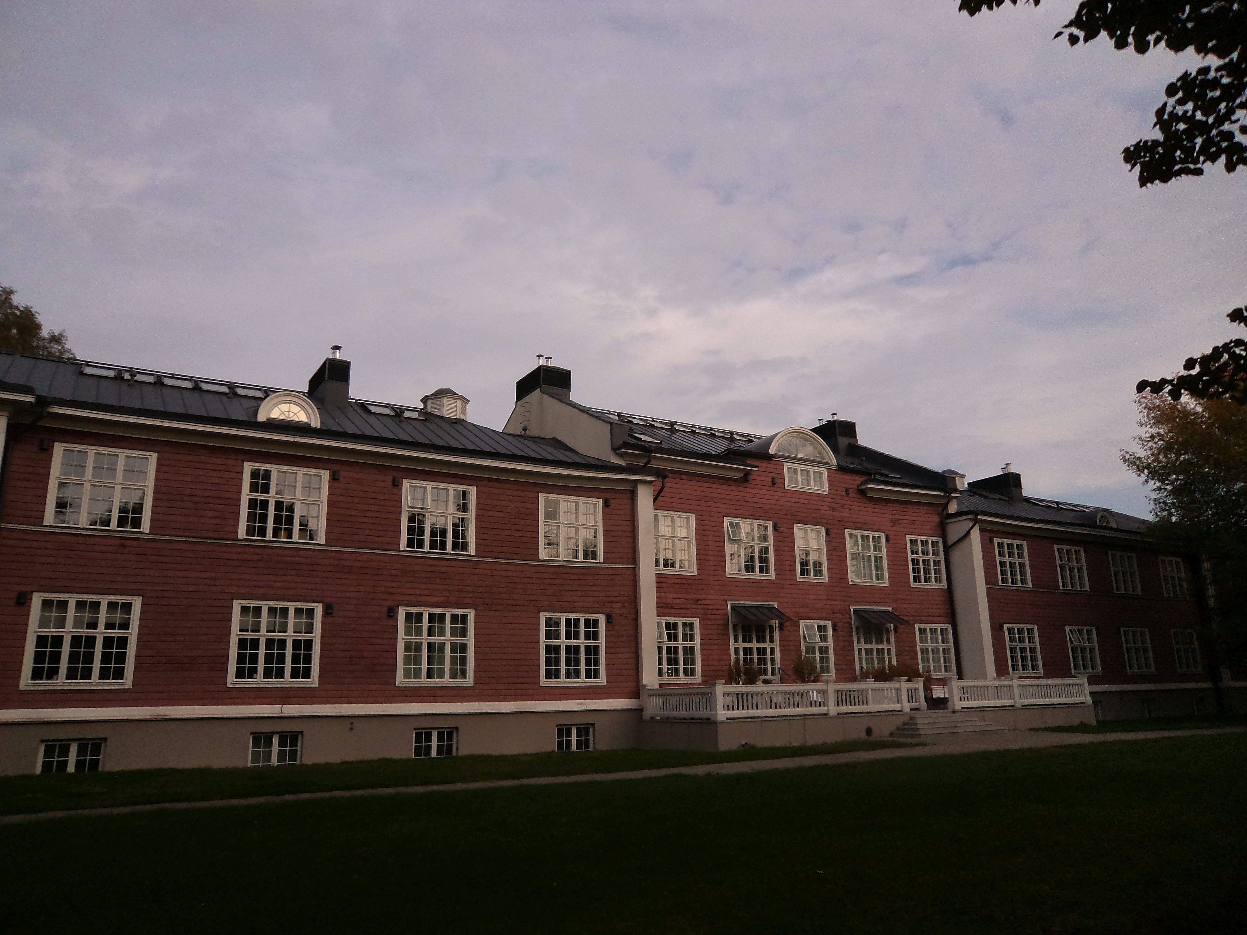 Tallinna Tiisikushaigla hoone, 1926. a.